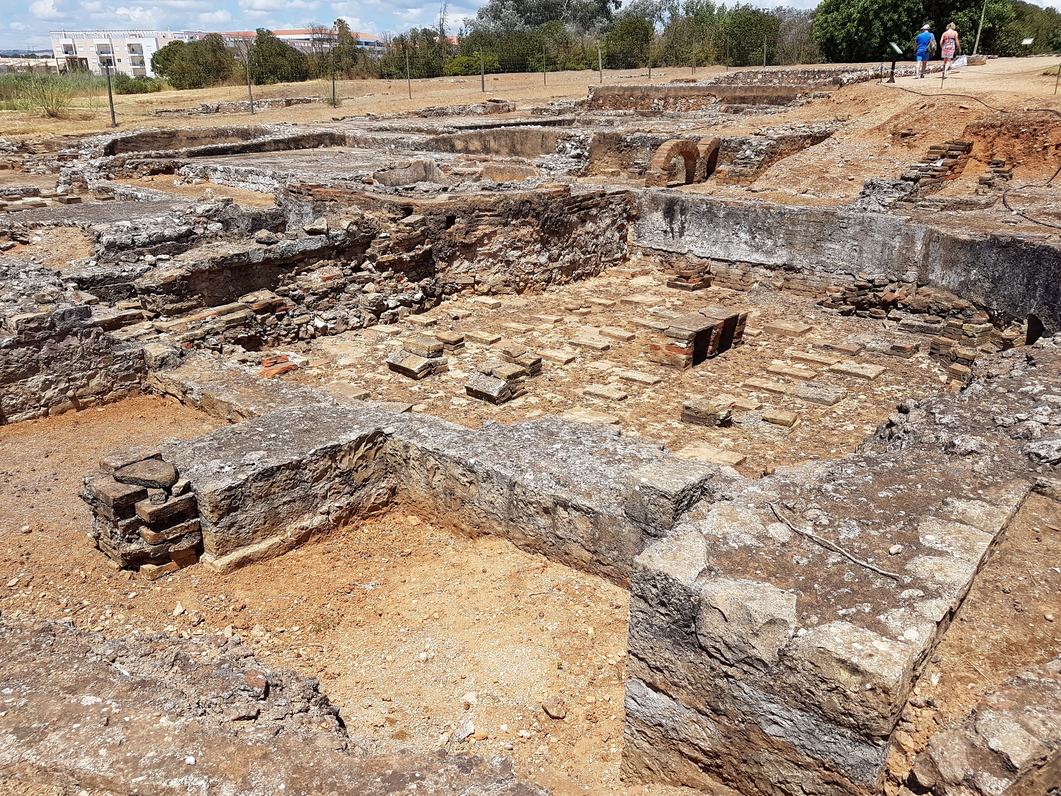 Cerro da Vila